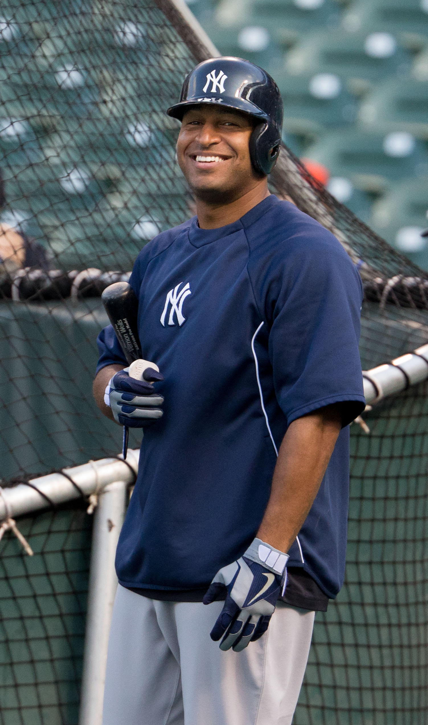 Vernon Wells